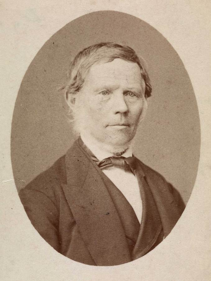 Olai Pedersen Wiig (født 10. oktober 1802 i Trøgstad, død 29. september 1887) var en norsk bonde og stortingsmann.